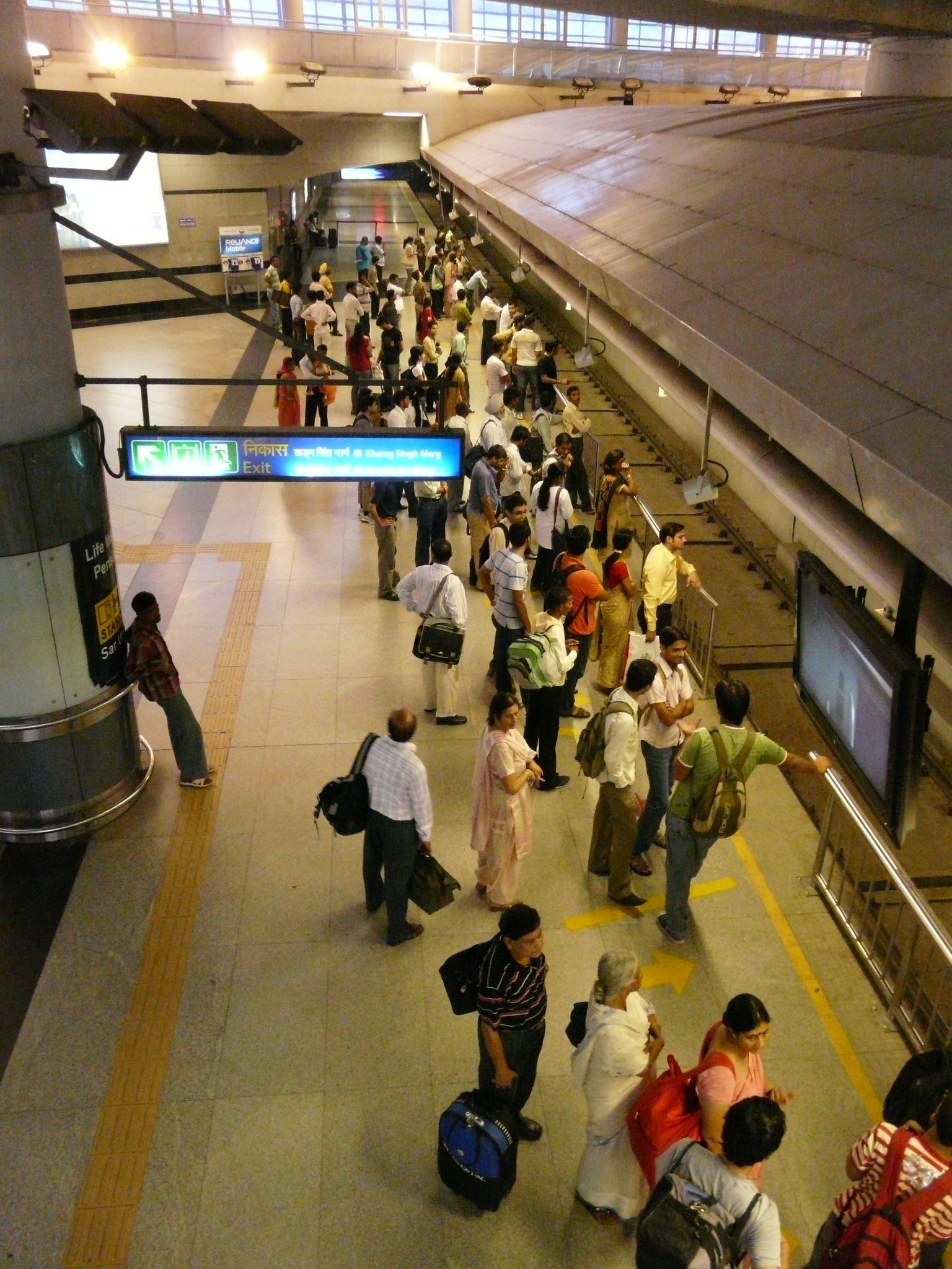 Blue line platform